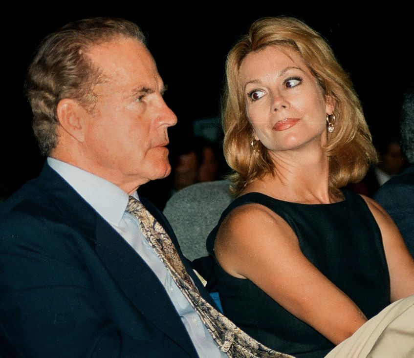 wash D.C. 1996